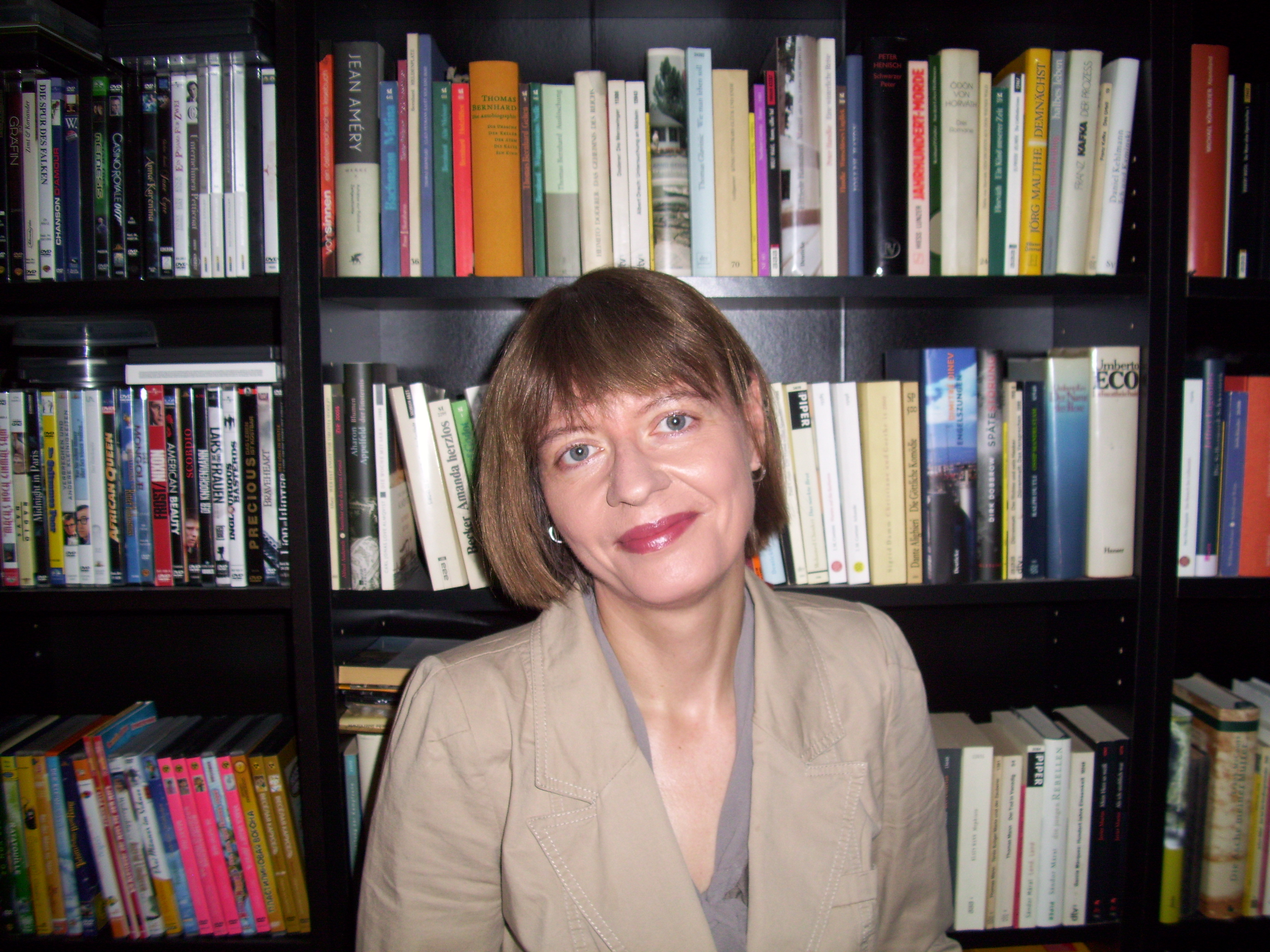 Verena Moritz (2017)